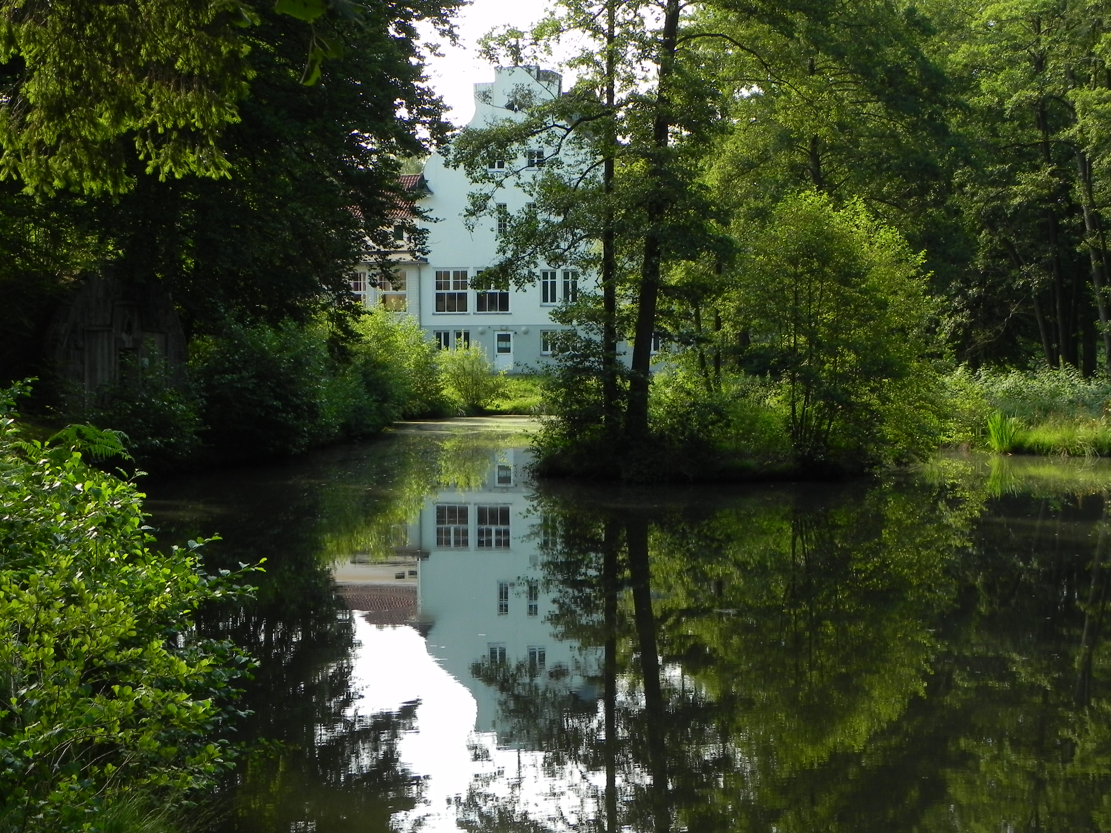 Schloss Bredebeck auf dem Truppenübungsplatz Bergen hinter einem Teich